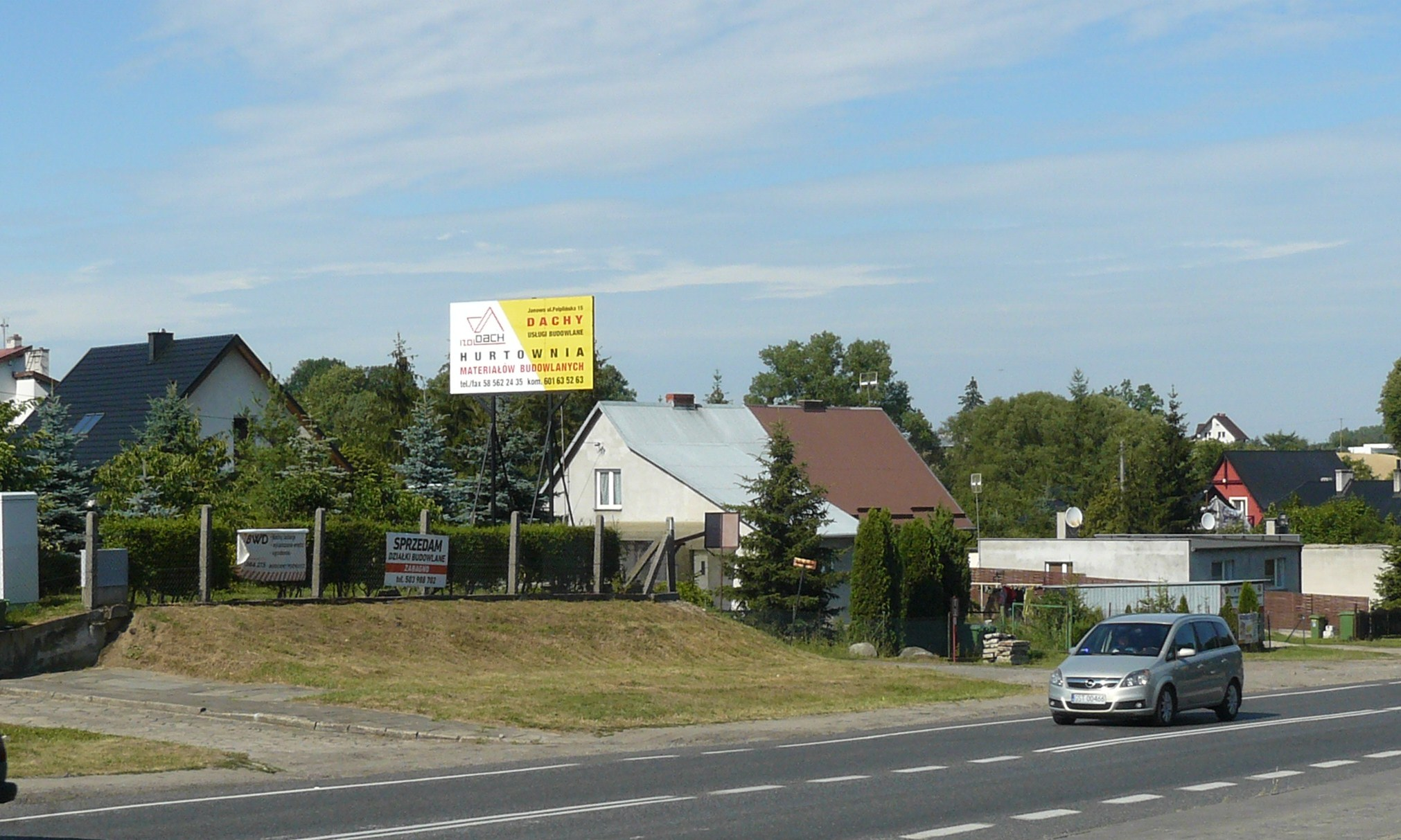 Rokocin - DK nr 22.